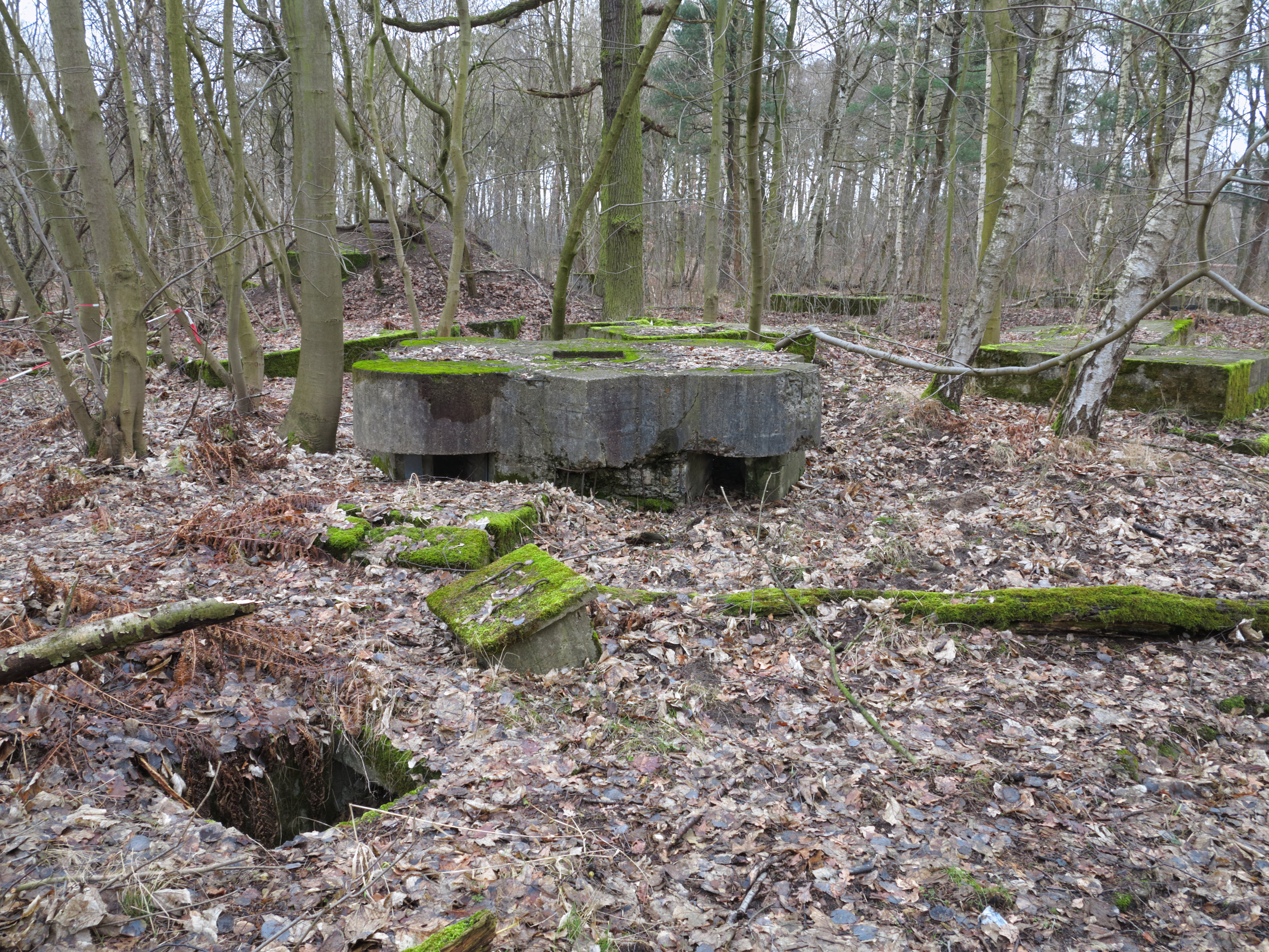 Braunschweig: das ehemalige Forschungsgelände des Institutes für baulichen Luftschutz der Technischen Hochschule Braunschweig im Querumer Forst. Hier wurden von 1939 bis 1945 Spreng- und Beschußversuche an Modellbunkern durchgeführt, unter anderem zur Entwicklung der Braunschweiger Bewehrung. Noch heute sind Reste dieser Modellbunker vorhanden.